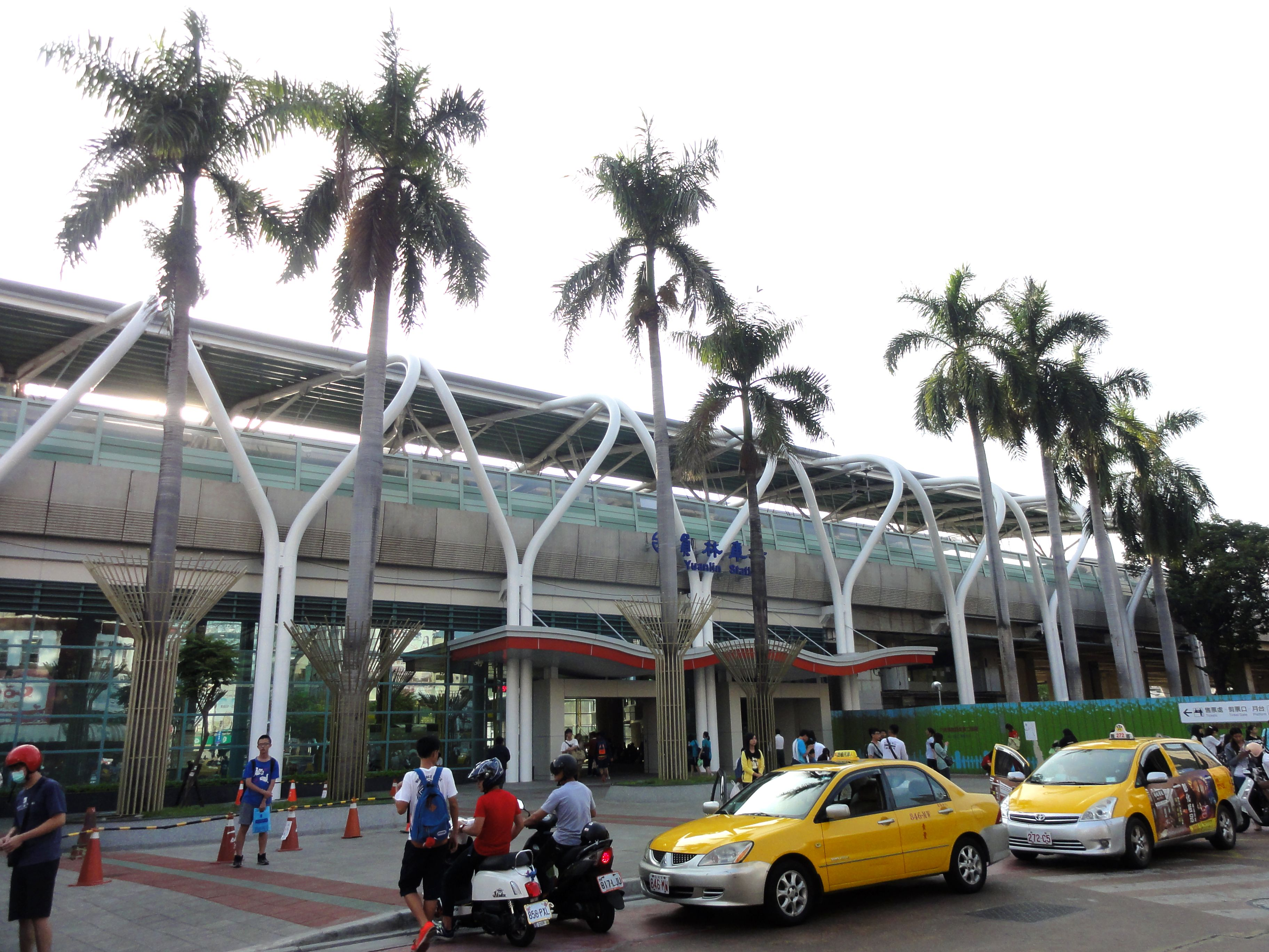 台鉄・員林駅